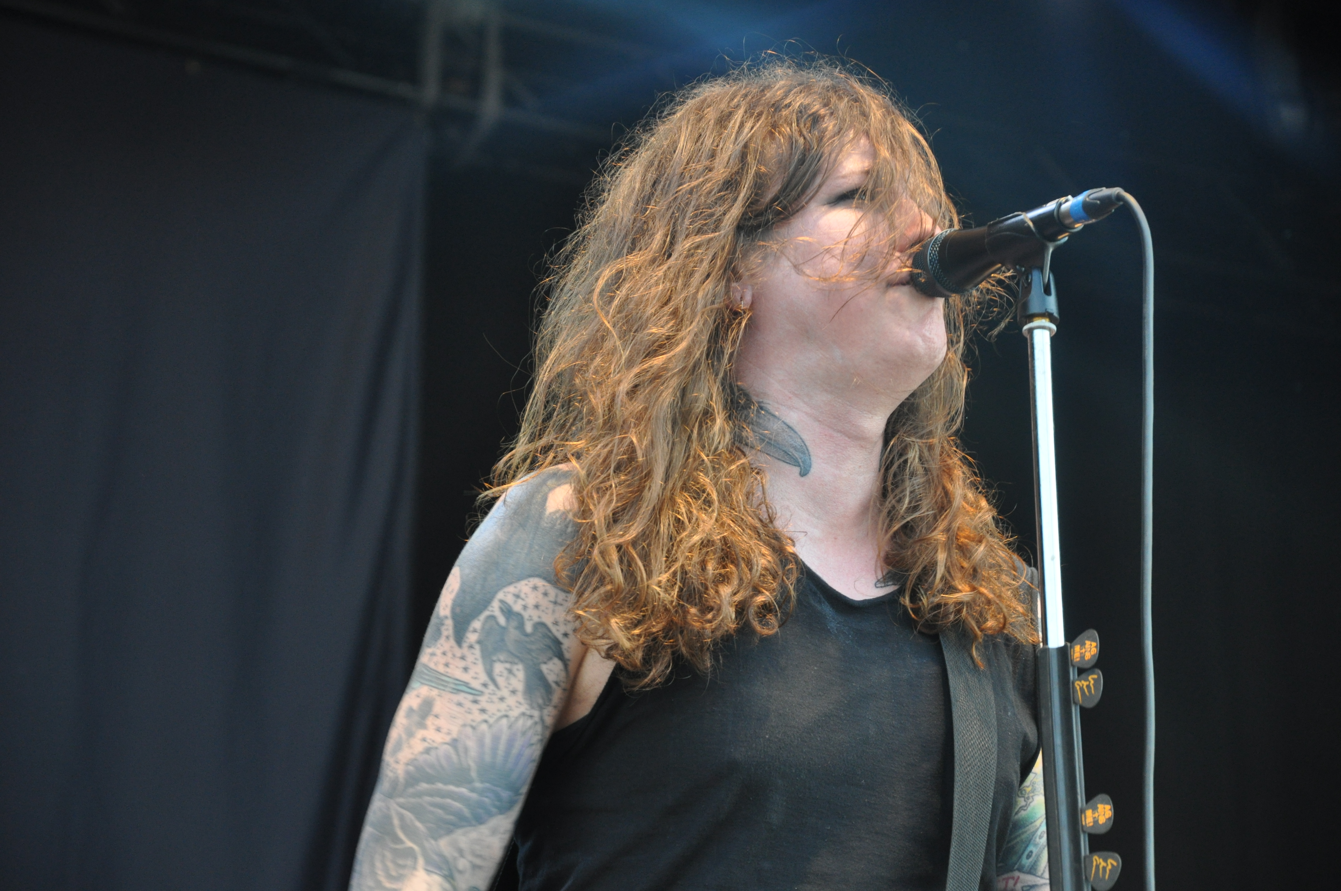 Against Me! bei Rock am Ring 2014